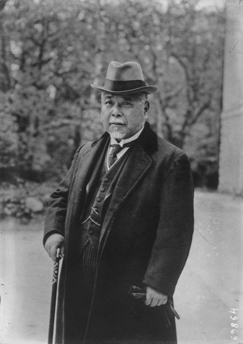 犬塚勝太郎。1921年。Inuzuka Katsutaro, Japanese Politician in 1920s.